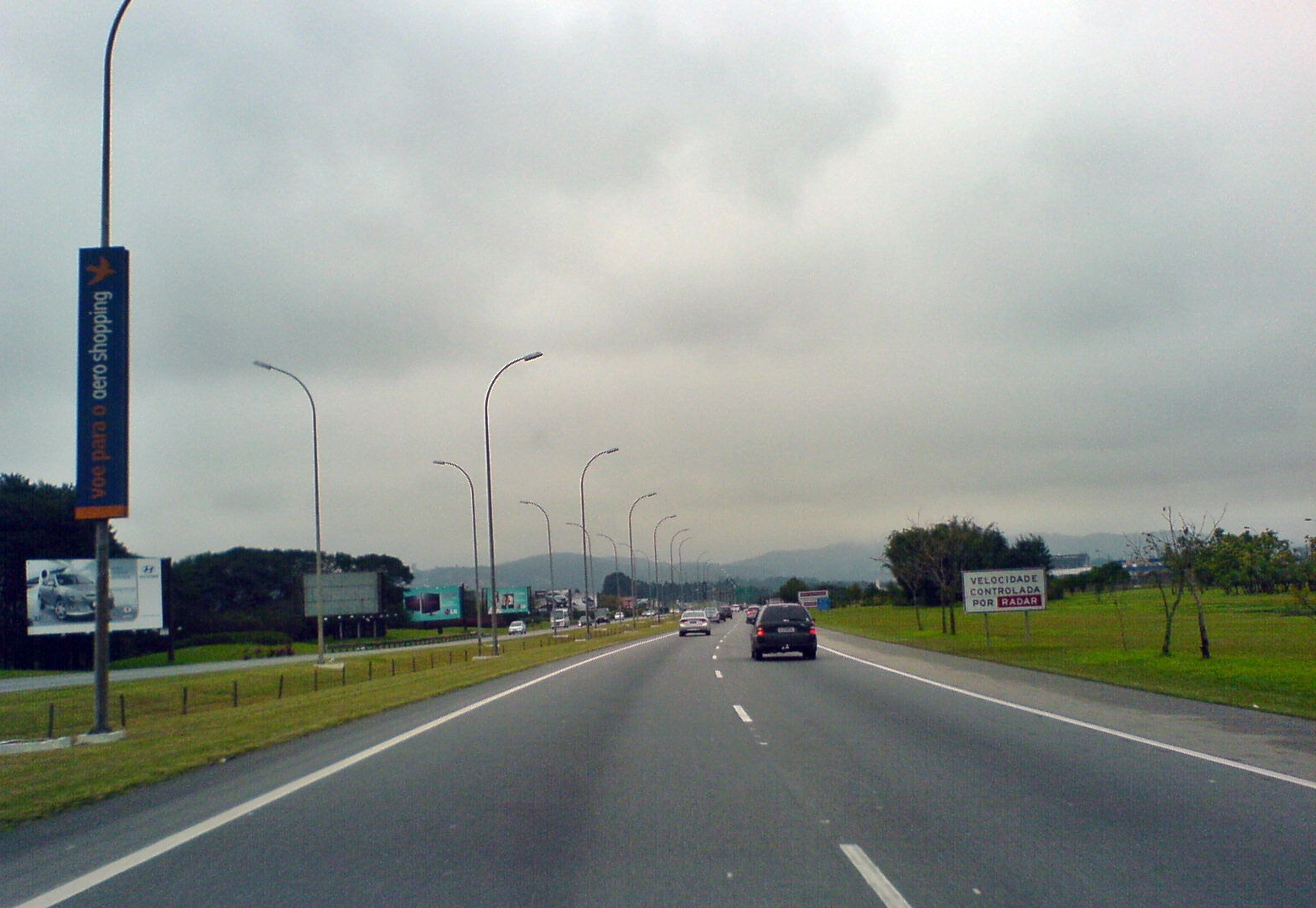 Guarulhos-SP